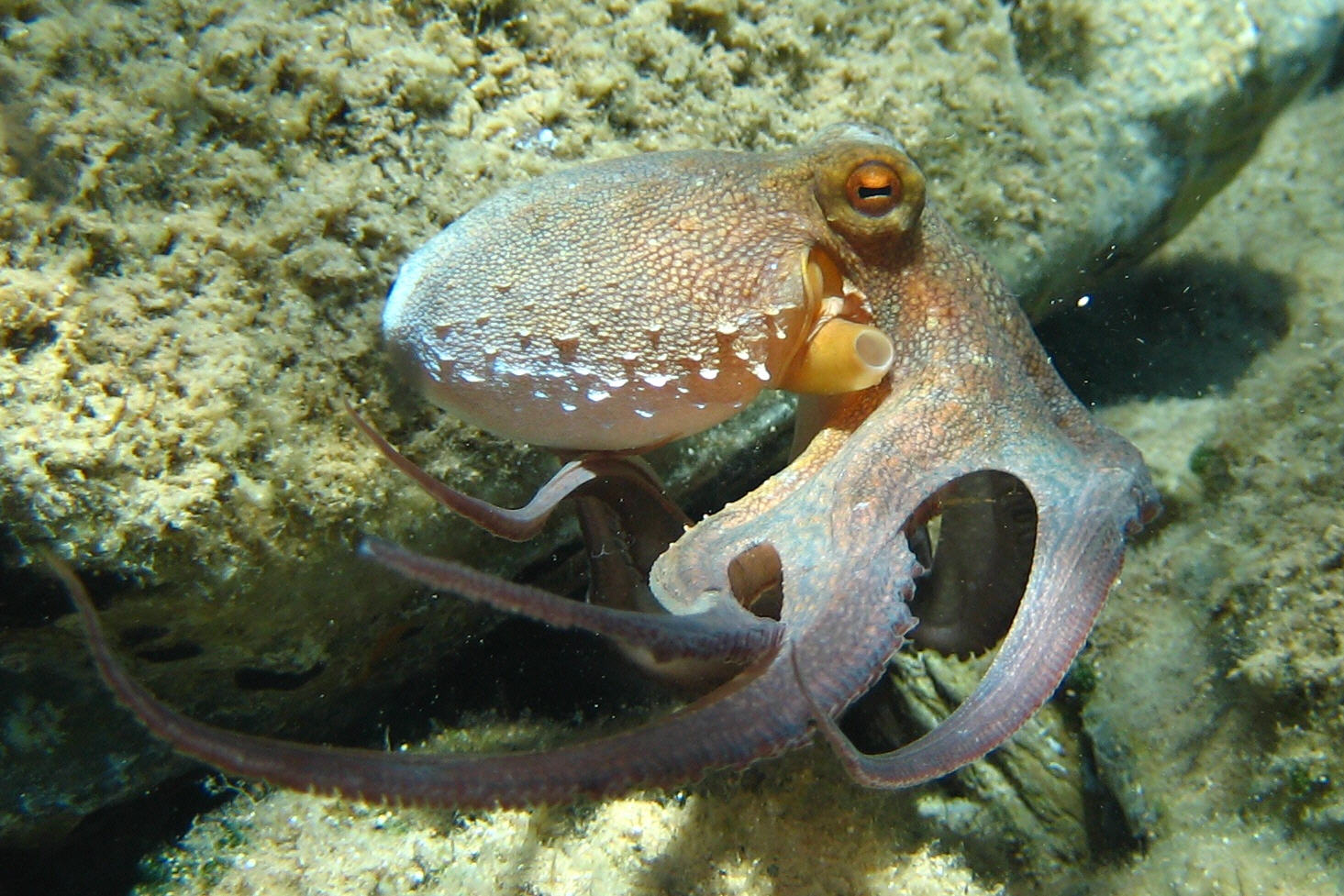 Gewöhnlicher Krake (Octopus vulgaris), Ostkreta, Griechenland, Tiefe 2-4m